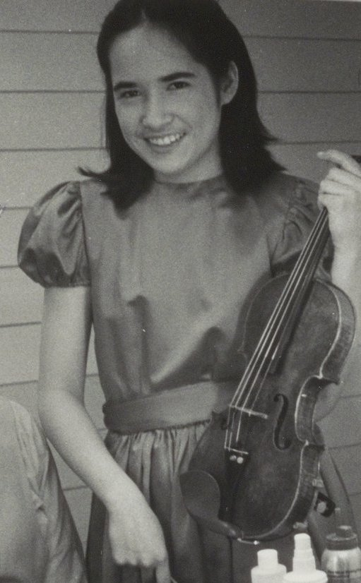 Violiste Viviane Hagner in gesprek met presentator Cees van Drongelen van het programma "Jonge Mensen op Weg naar het Concertpodium", in de kleedkamer van het concertgebouw.